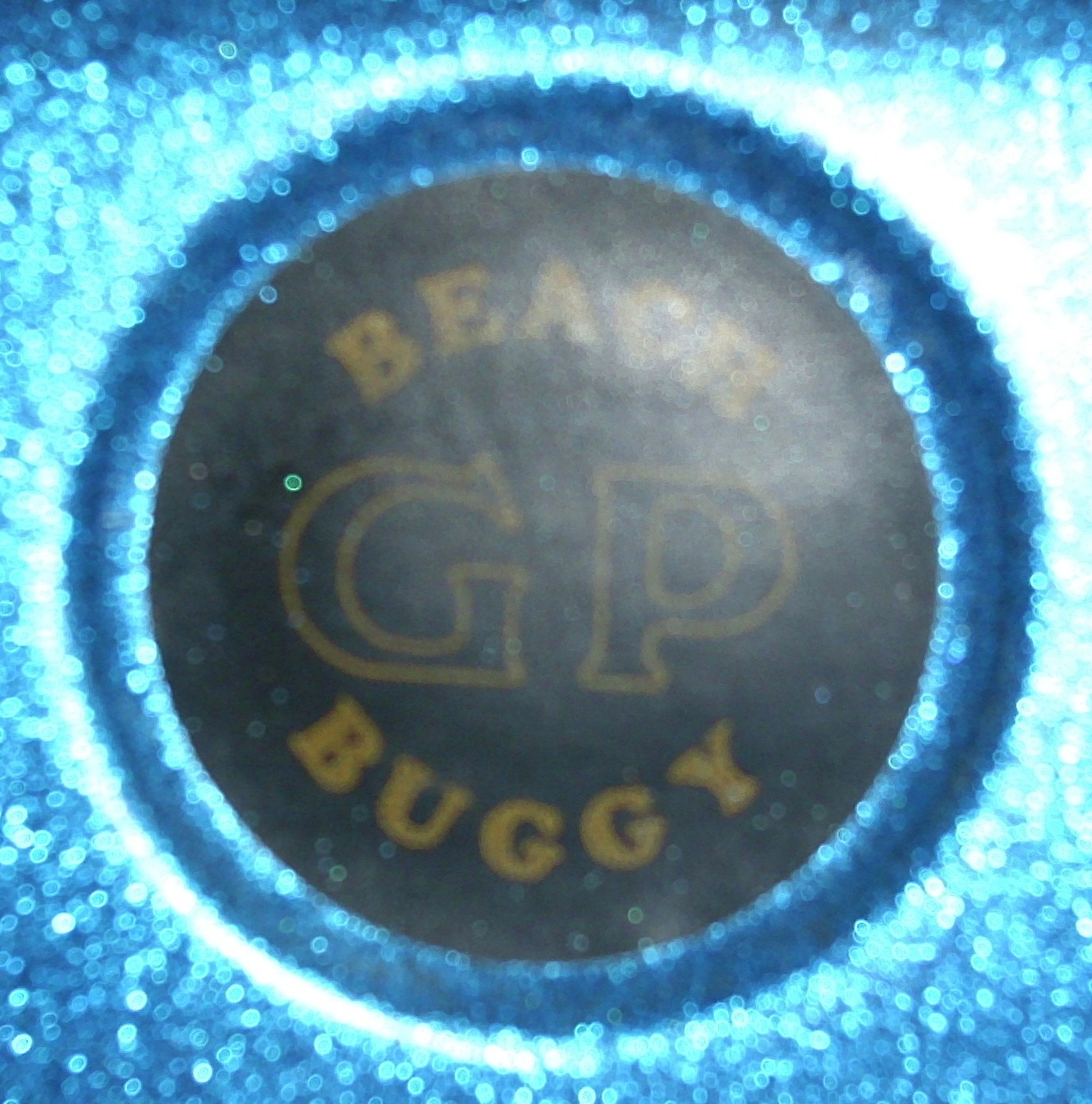 Emblem GP